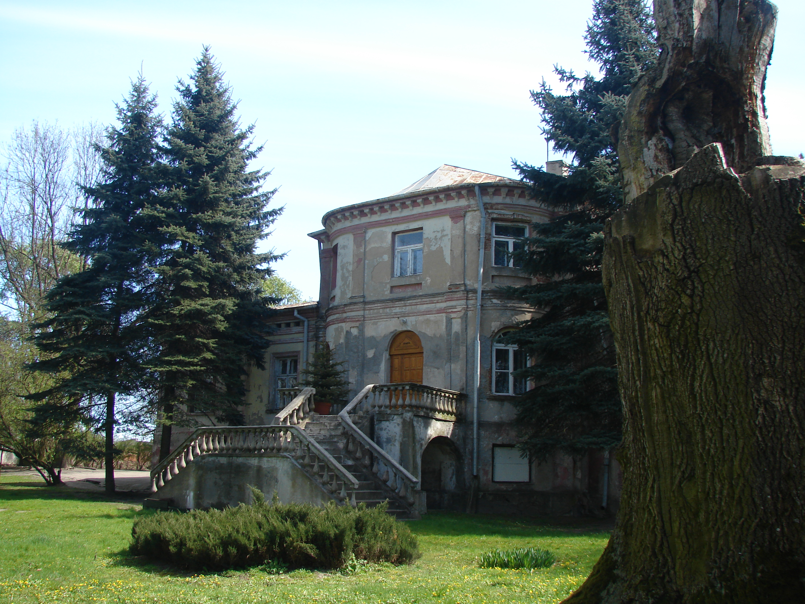 Dwór w Steklinie z XIX w. elewacja wschodnia